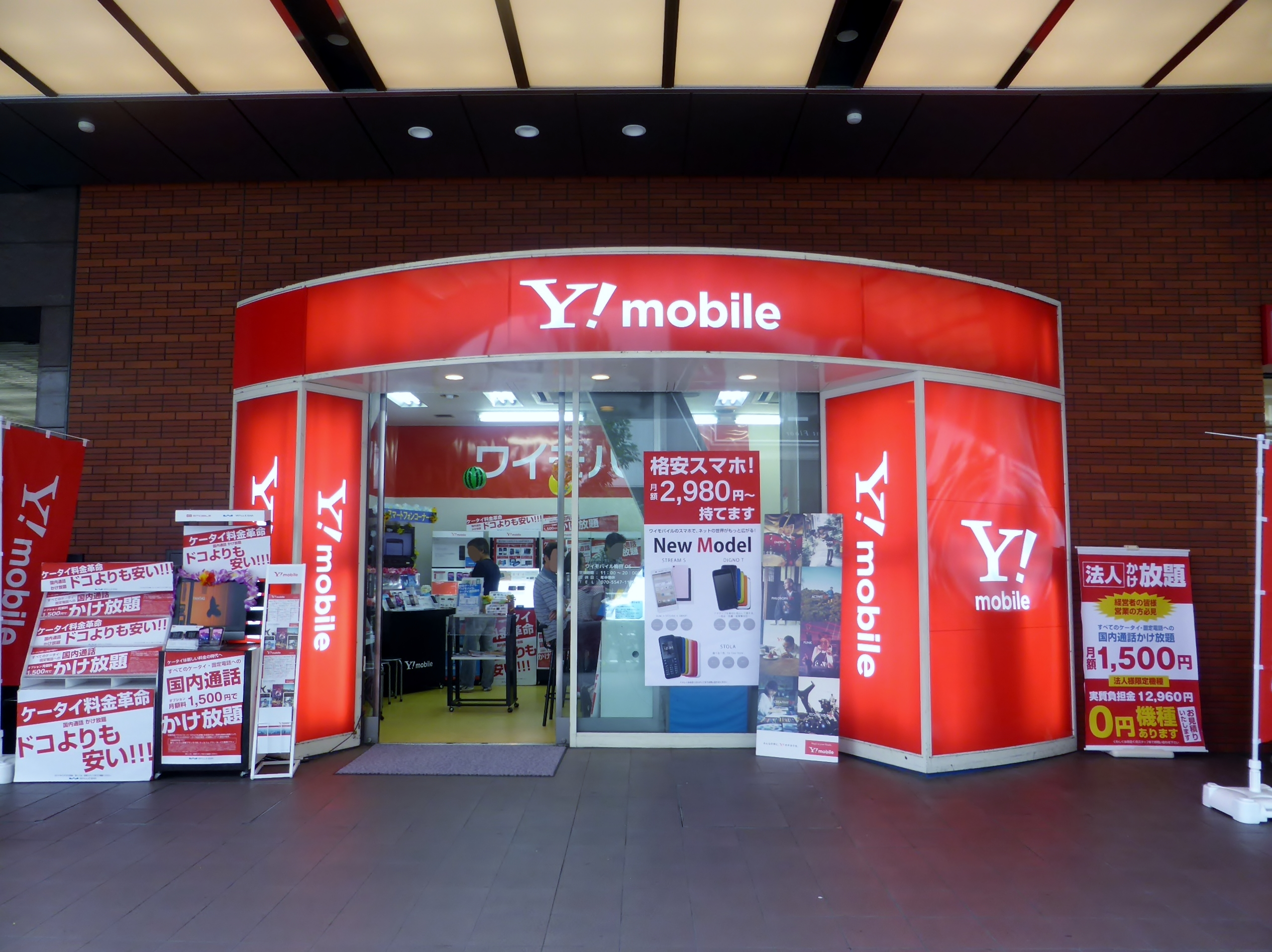 ワイモバイル梅田OSを撮影。元々はウィルコムプラザ梅田OSだった。